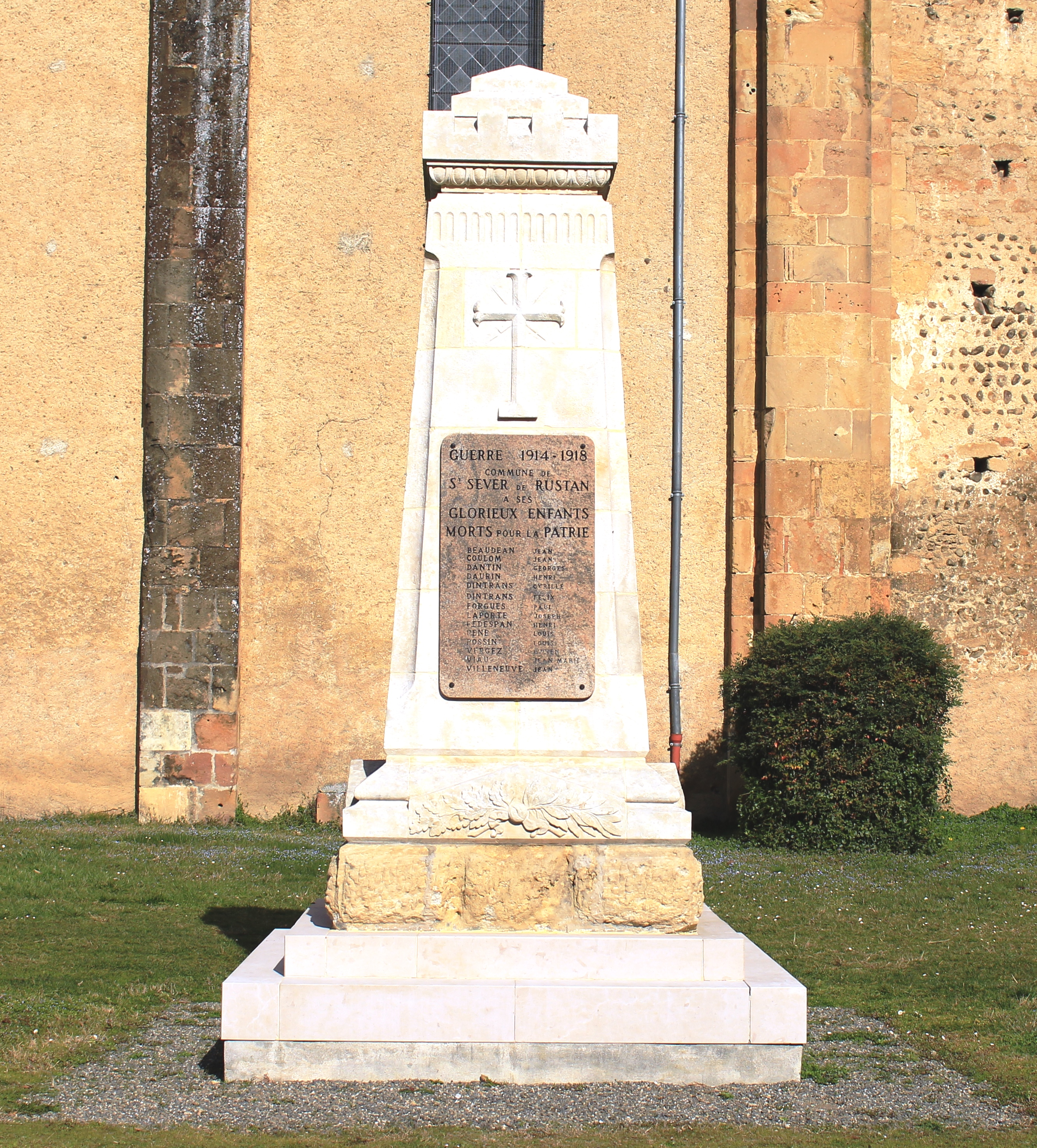 Monument aux morts de Saint-Sever-de-Rustan (Hautes-Pyrénées)